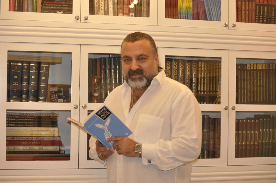 Beyaz Yakalının Akıl Defteri